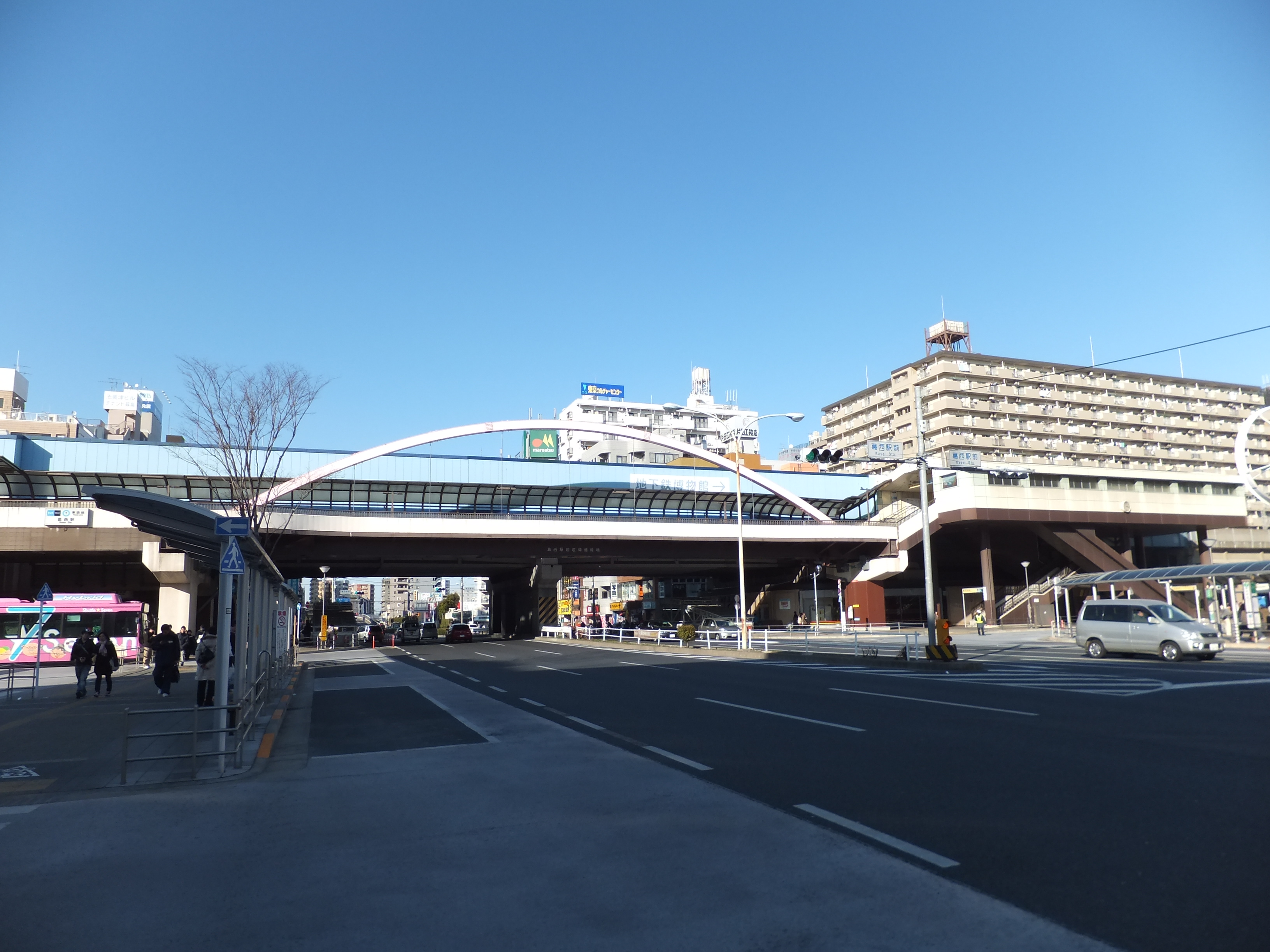 東京メトロ東西線葛西駅